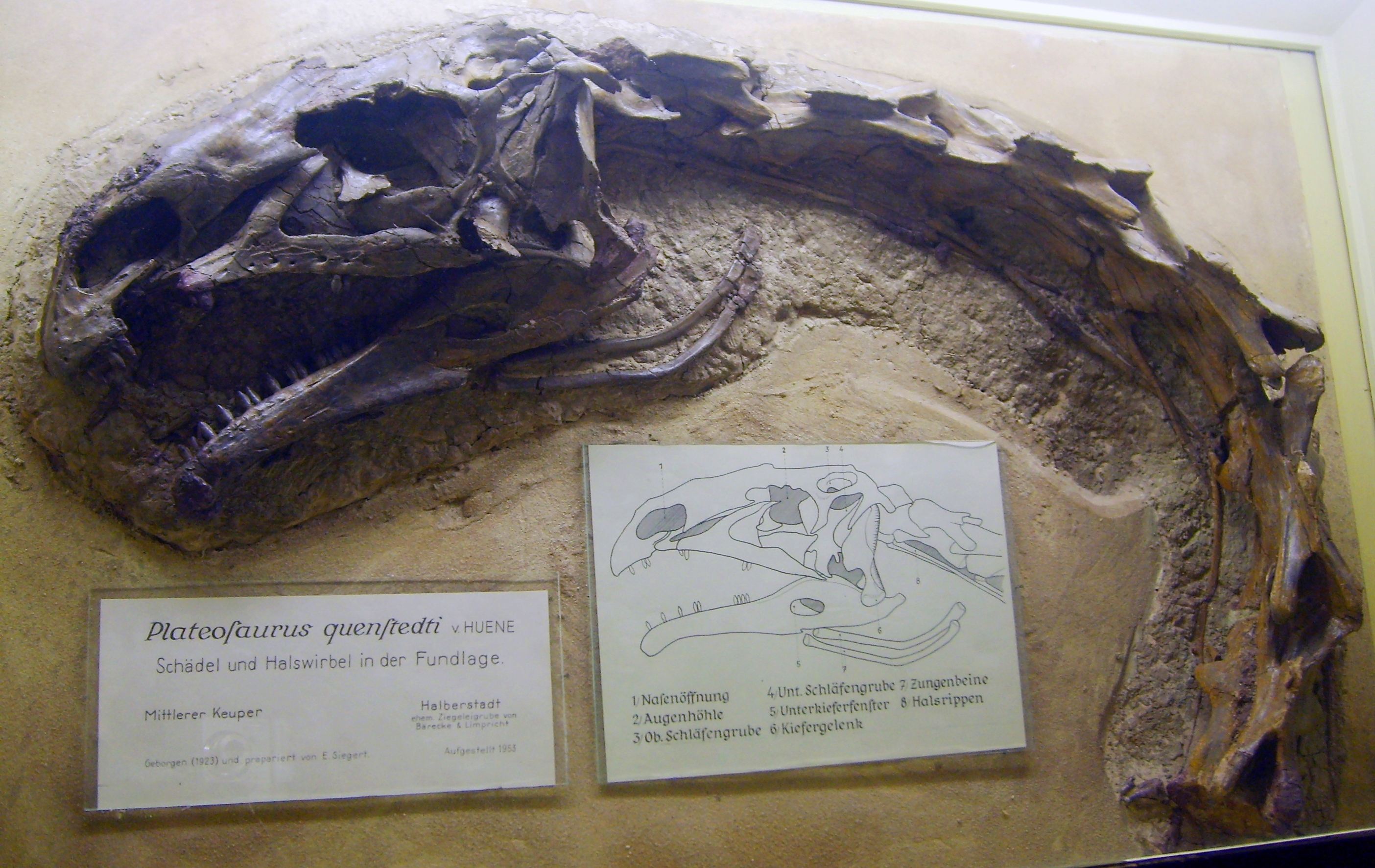 Plateosaurus engelhardti (previously P. quenstedti, also assigned to P. longiceps) skull and neck at the Museum für Naturkunde, Berlin, specimen HMN MB.1927.19.1. Plateosaurus quenstedti v.HUENE Schädel und Halswirbel in der Fundlage. Mittlerer Keuper Geborgen (1923) und präpariert von E. Siegert. Halberstadt ehem. Ziegeleigrube von Barecke & Limpricht Aufgestellt 1955 1. Nasenöffnung 2. Augenhöhle 3. Ob. Schläfengrube 4. Unterkieferfenster 6. Kiefergelenk 7. Zungenbeine 8. Halsrippen